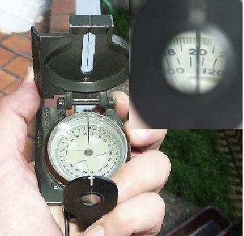 Boussole de l'armée américaine avec vue grossie de la rose.